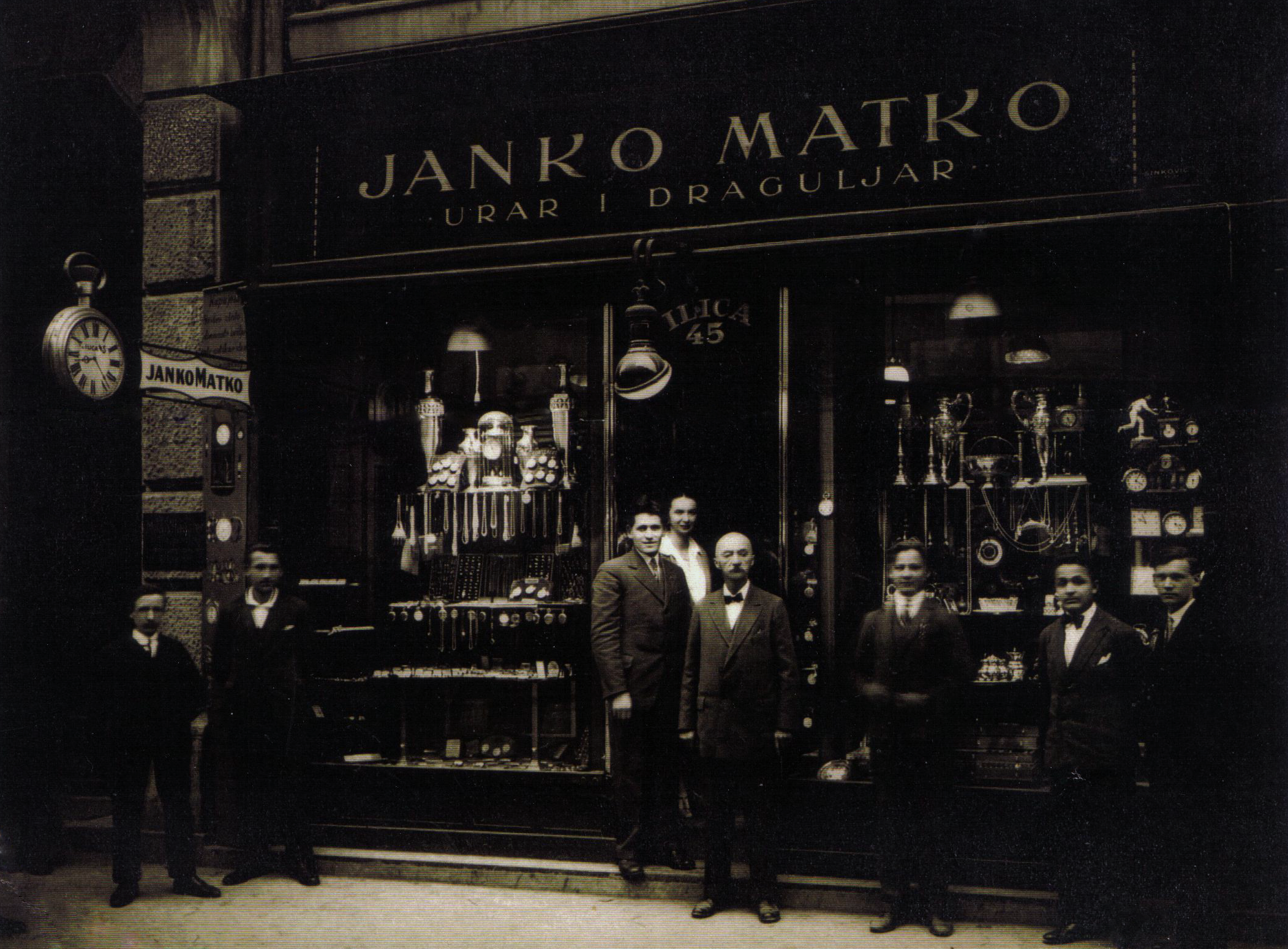 Zlatarska radnja Janka Matka